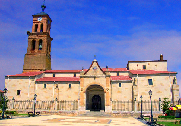 Plaza Mayor de Villamañán_César Pérez